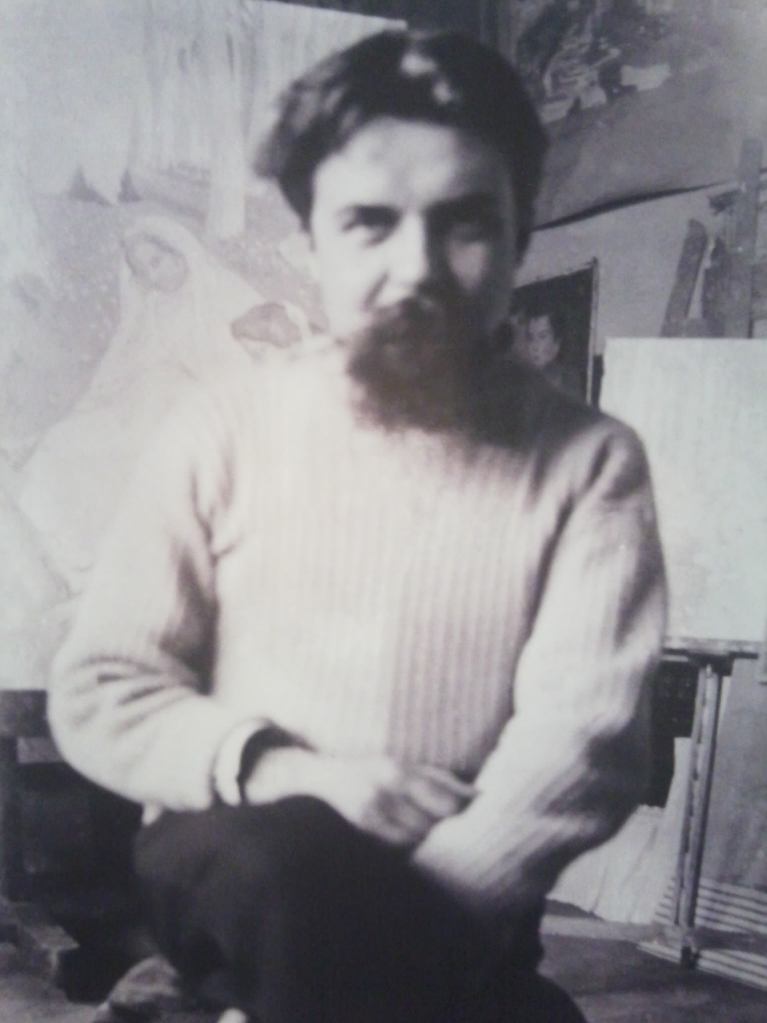 Photographie de Maurice Denis - Collectif, Maurice Denis, l'éternel printemps, Hazan, 2012, 152 p.